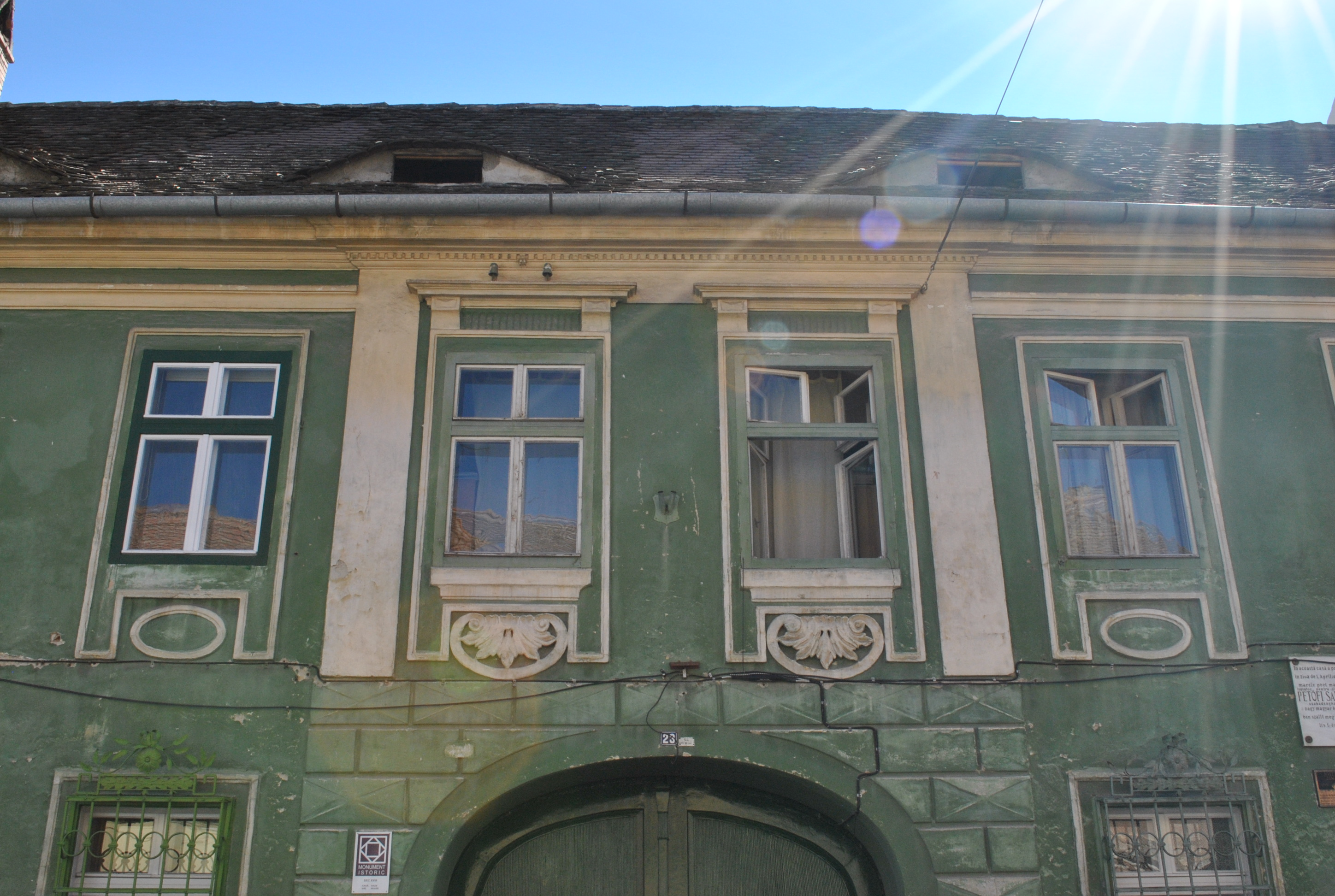 Casă, sec. XVIII